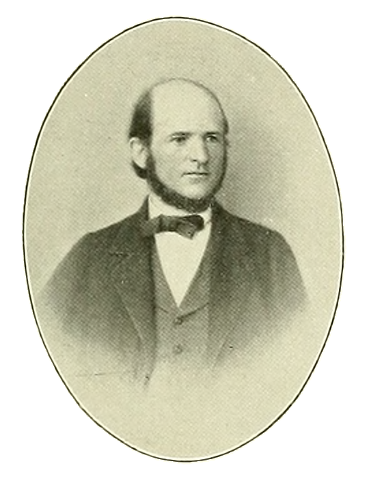 Portrait de Heinrich Karl Hermann Hoffmann.